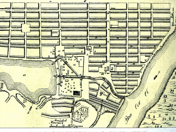 План Барнаула